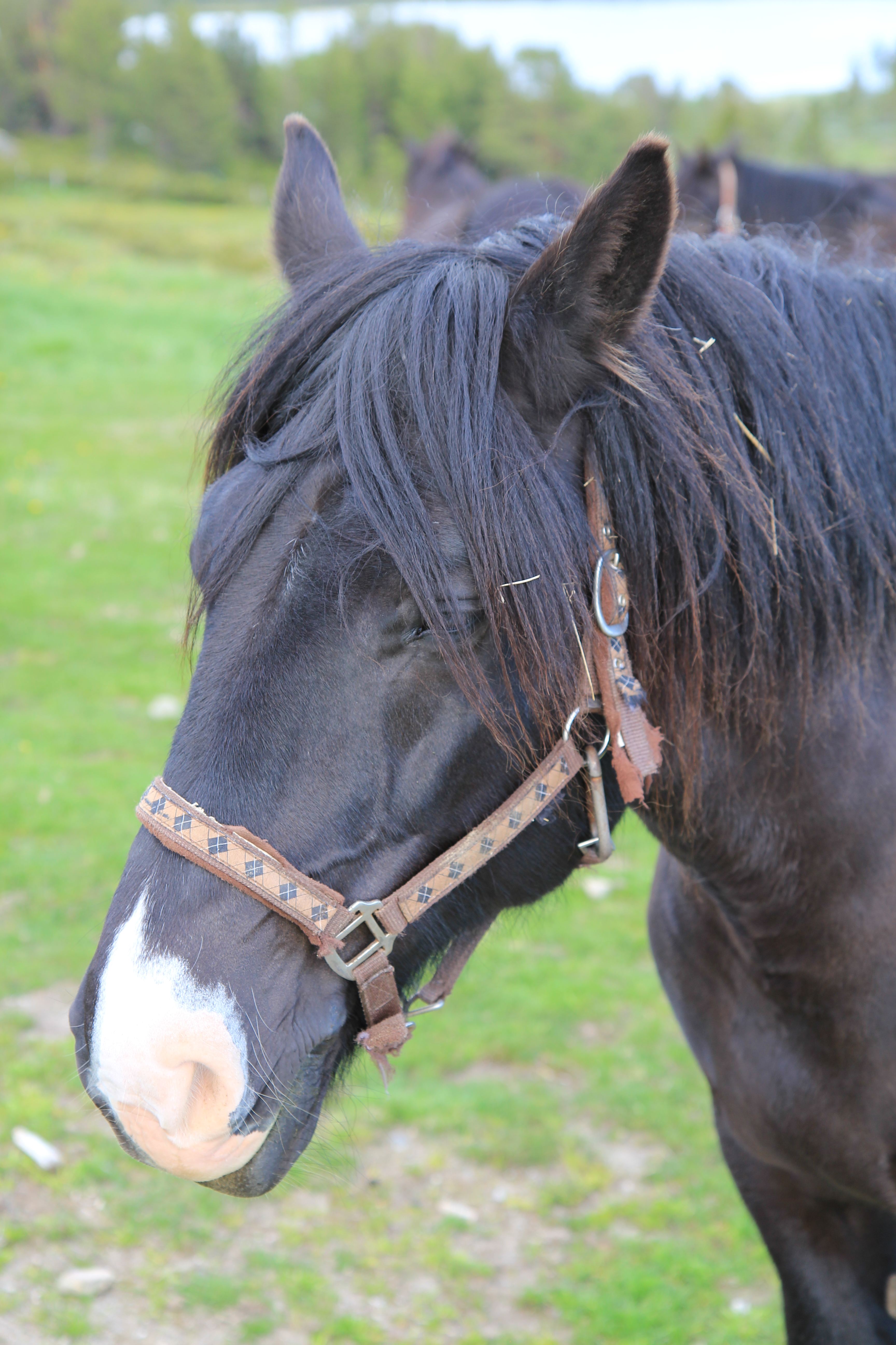 Kaldblodshest